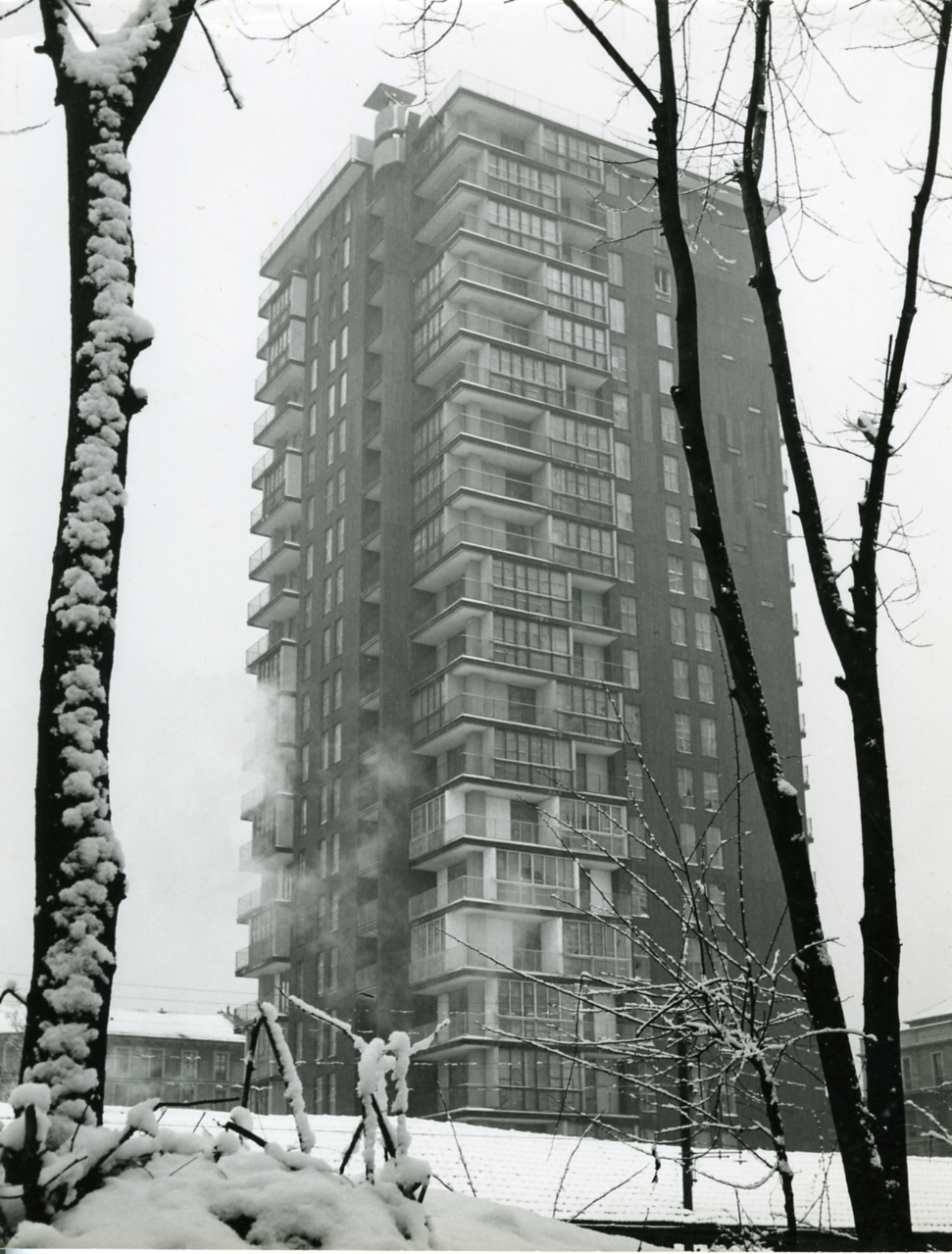 Servizio fotografico : Milano, 1970 / Paolo Monti, Istituto di fotografia Paolo Monti. - Stampe: 2 : Positivo b/n, gelatina bromuro d'argento/ carta, 24x30. - ((Al verso di una stampa manoscritto: "Arch. Magistretti Casa d'abitazione Milano". Sul coperchio della scatola, manoscritto a pennarello: "Milano Pirelli Gratt."